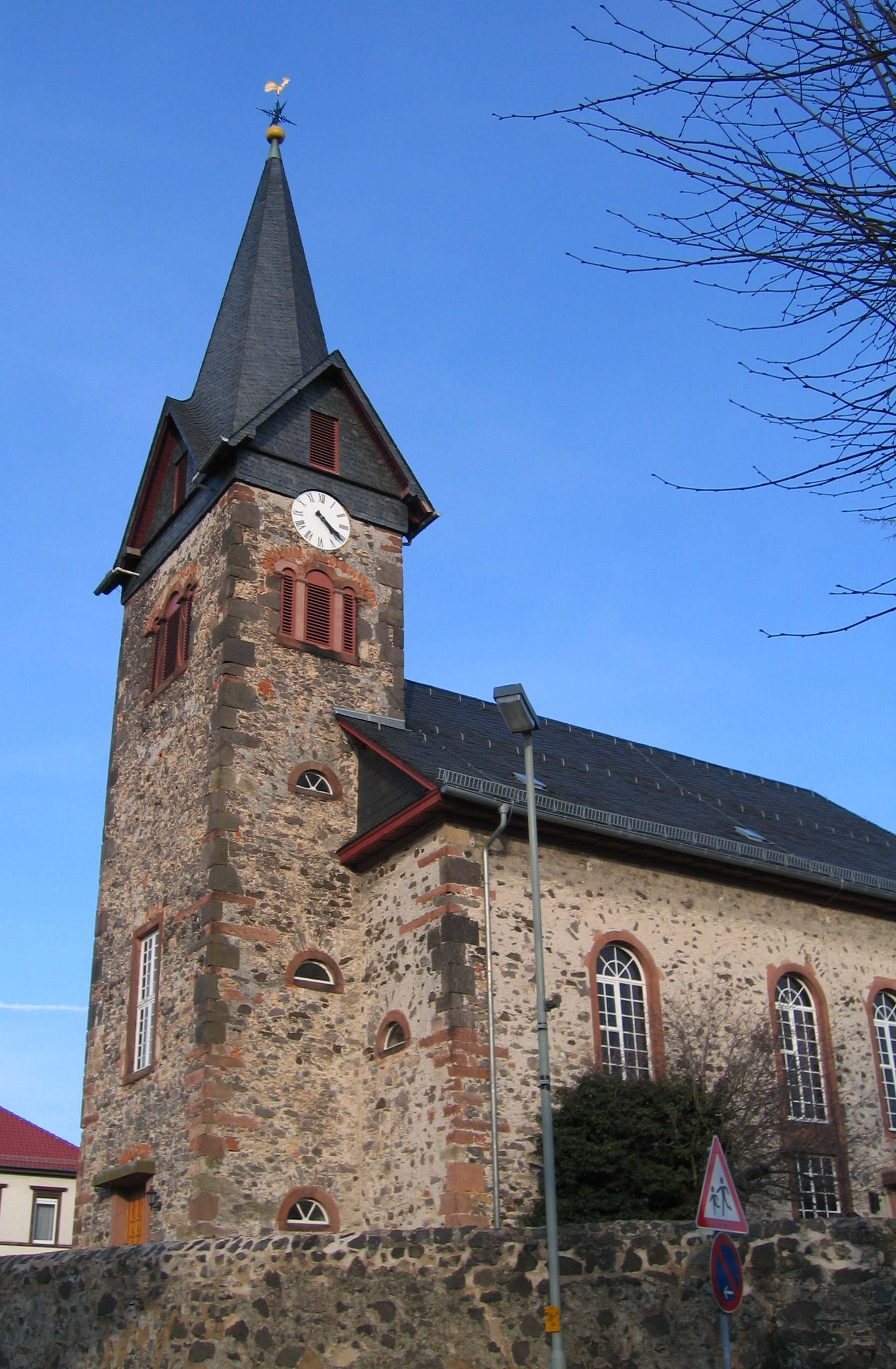 Glockenturm der evangelisch-lutherischen Kirche in Melbach. Südseite des Turmes (also Blickrichtung Norden).